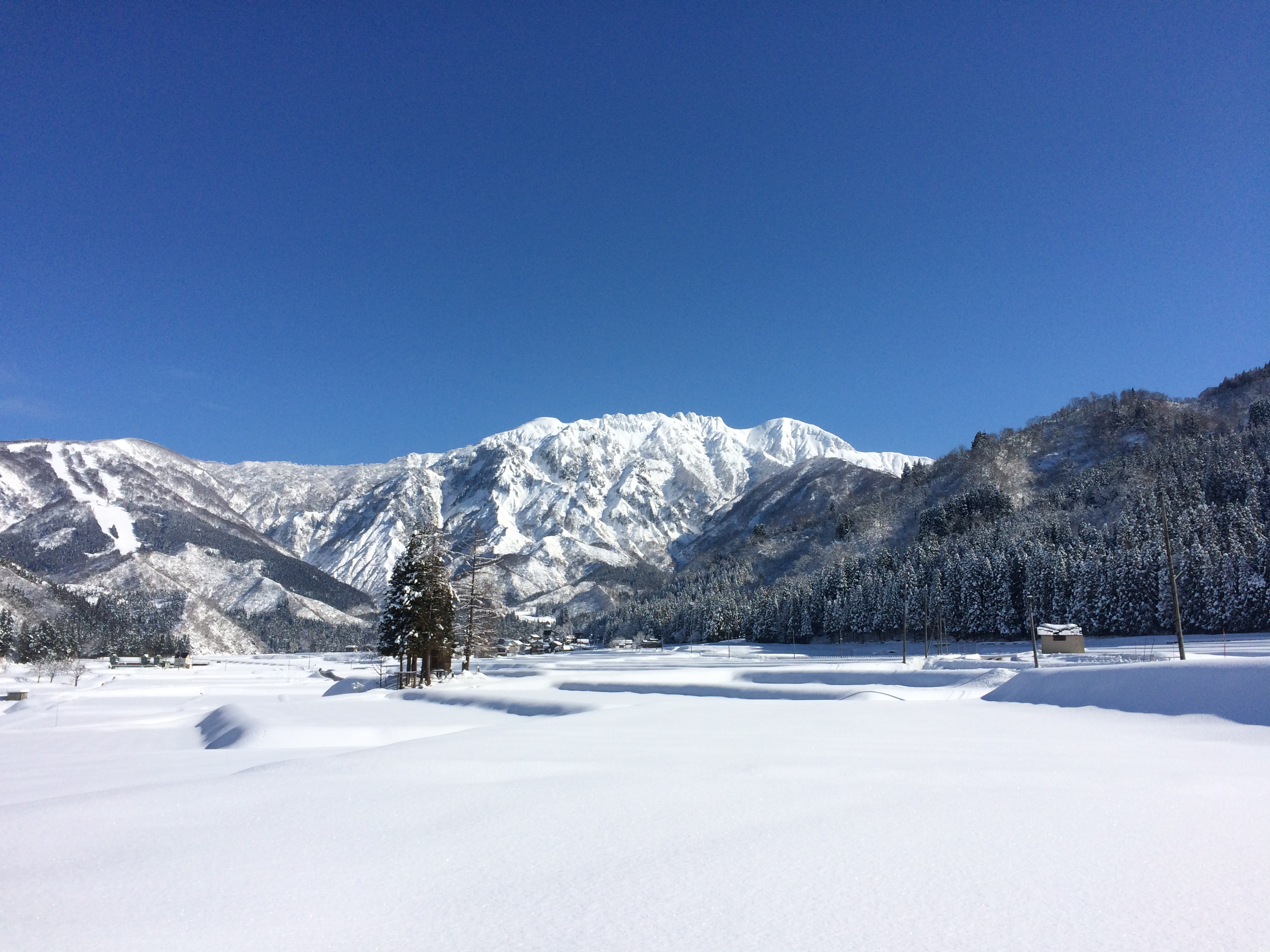 冬季の八海山 城内山口地域より撮影